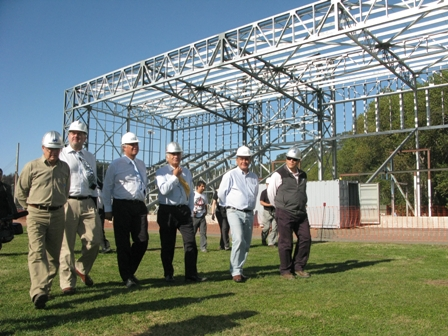 El alcalde Talcahuano, Gastón Saavedra; el vicepresidente de la Cámara de Diputados; Raúl Sunico; y el presidente del Club Deportivo Huachipato, Arturo Aguayo, visitaron esta tarde los trabajos del nuevo Estadio Cap que, hasta la fecha, tiene un total de 60 por ciento de avance, según explicó el ingeniero a cargo de la obra, Víctor Bustos.